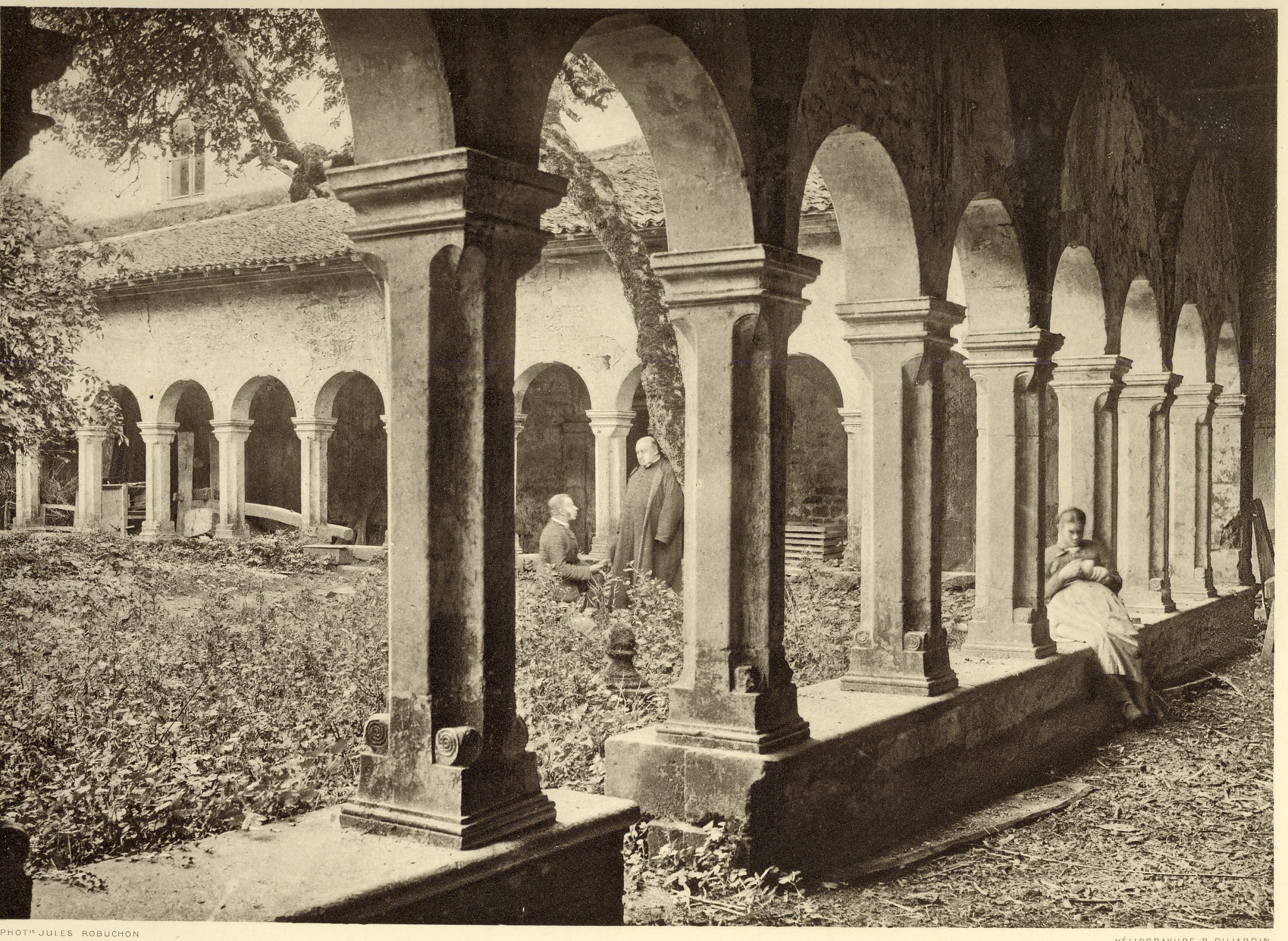 Le cloître de l'ancienne abbaye des Châtelliers en 1889; destruction 1930.